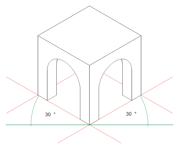 Darstellung der Isometrie